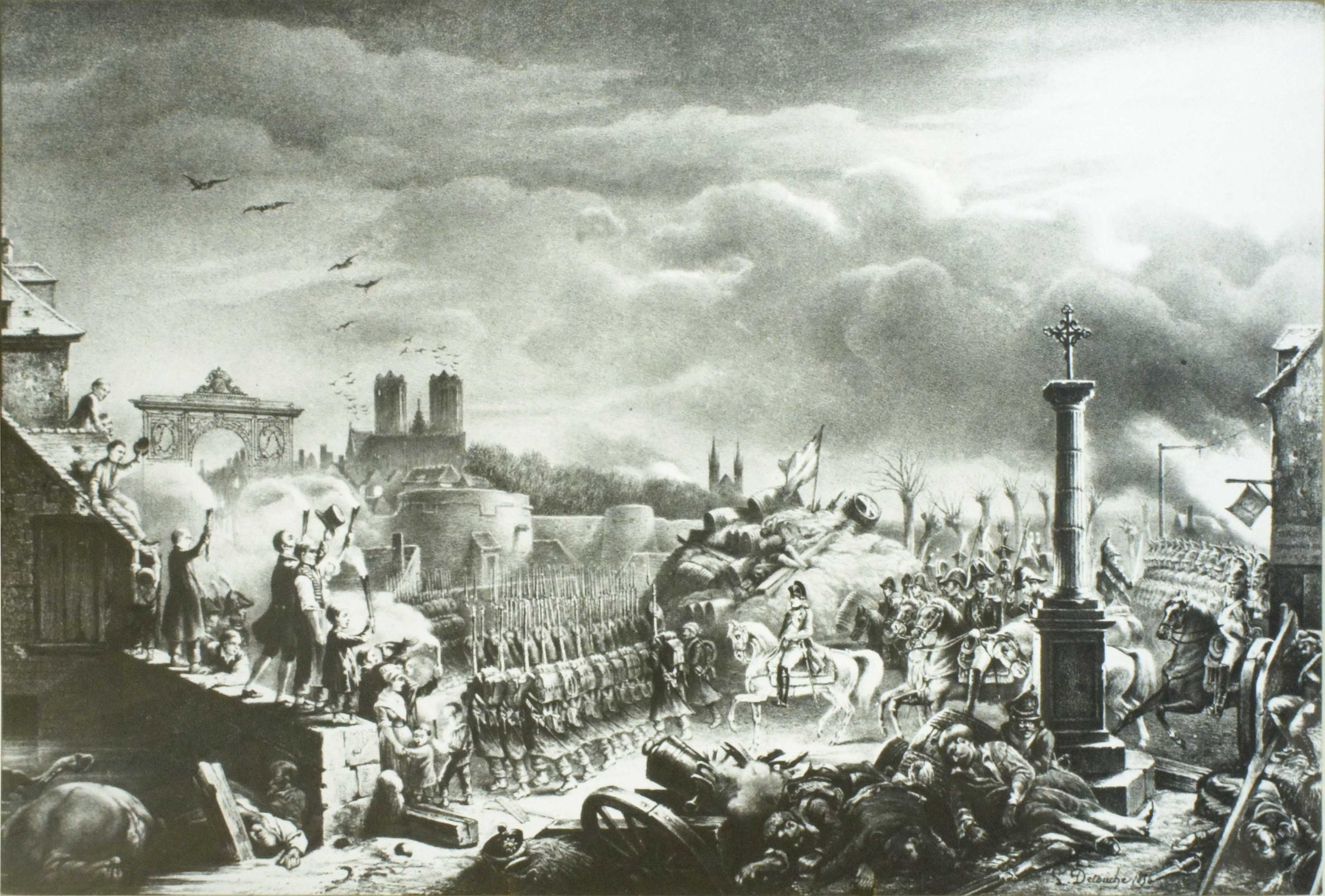 Bataille_de_Reims_1814, Napoléon entre victorieux en la ville . Gravue de 1834 .